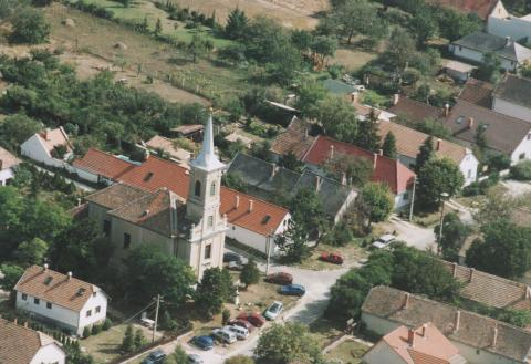 Telki, Hungary, aerialphotography. Szent István király római katolikus templom